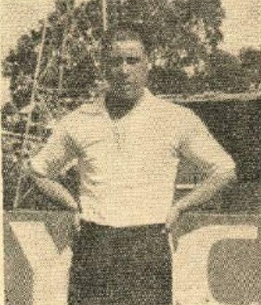 Serafin Manzanedo pionero del futbol mexicano de 1915 .